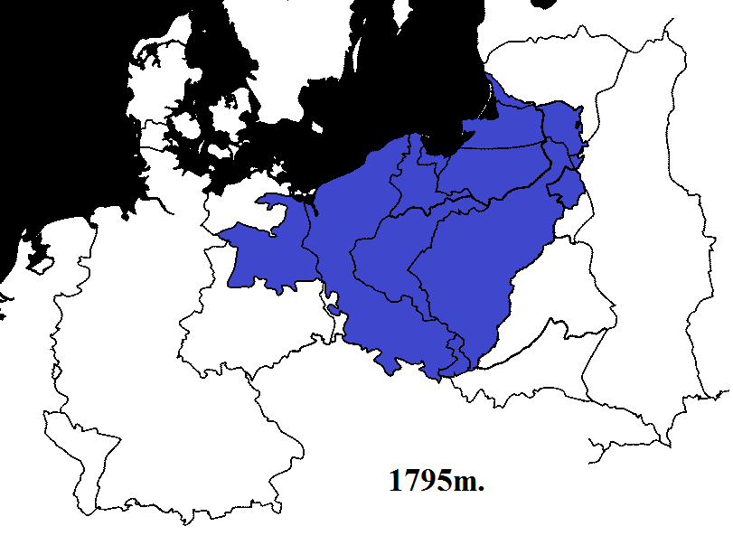 Prūsijos didžiausia teritorija (po ATR padalijimų)